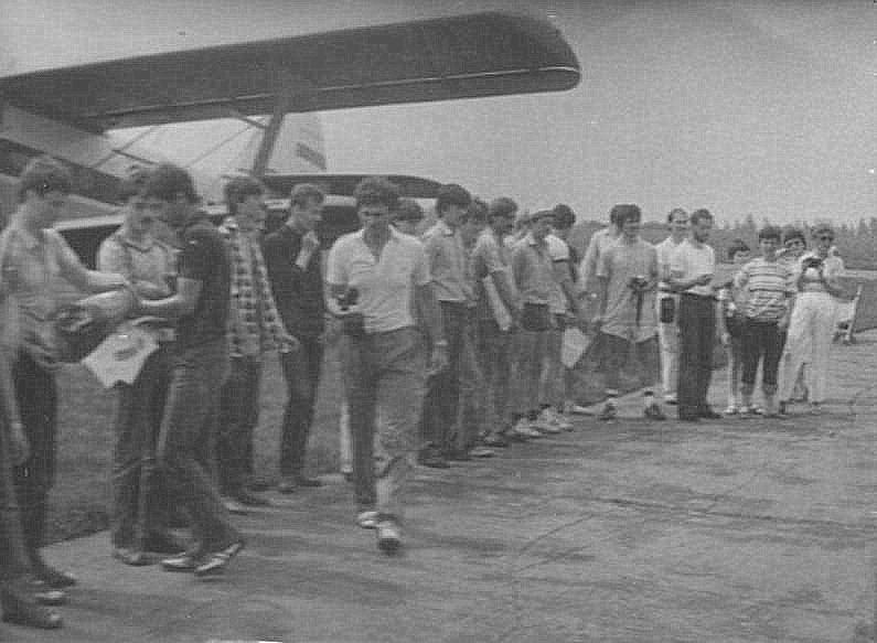 VII Międzynarodowe Klubowe Zawody Spadochronowe Gliwice 1983, An-2TD SP-ANW, nagrody wręczone – Sekcja Spadochronowa Aeroklubu Gliwickiego